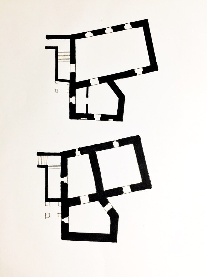 Схема